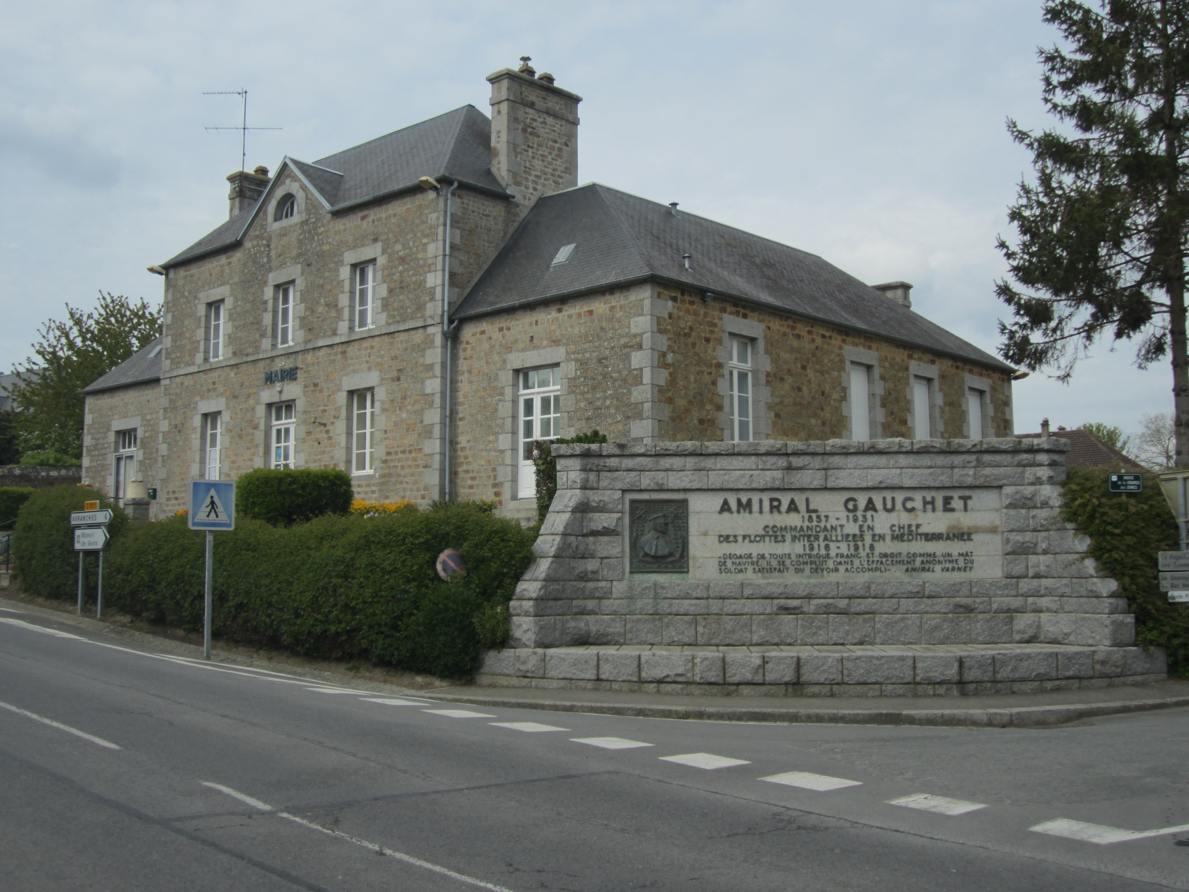 Vains, Manche